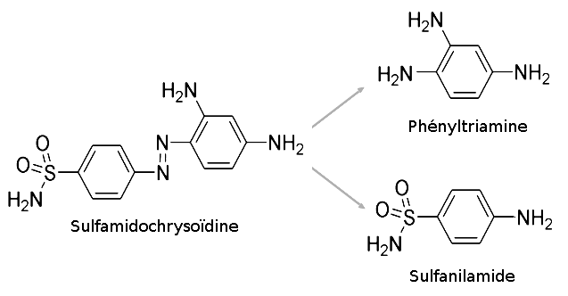 Métabolisation du Prontosil (sulfamidochrysoïdine) en phényl-1,2,4-triamine et sulfanilamide (principe actif du médicament)